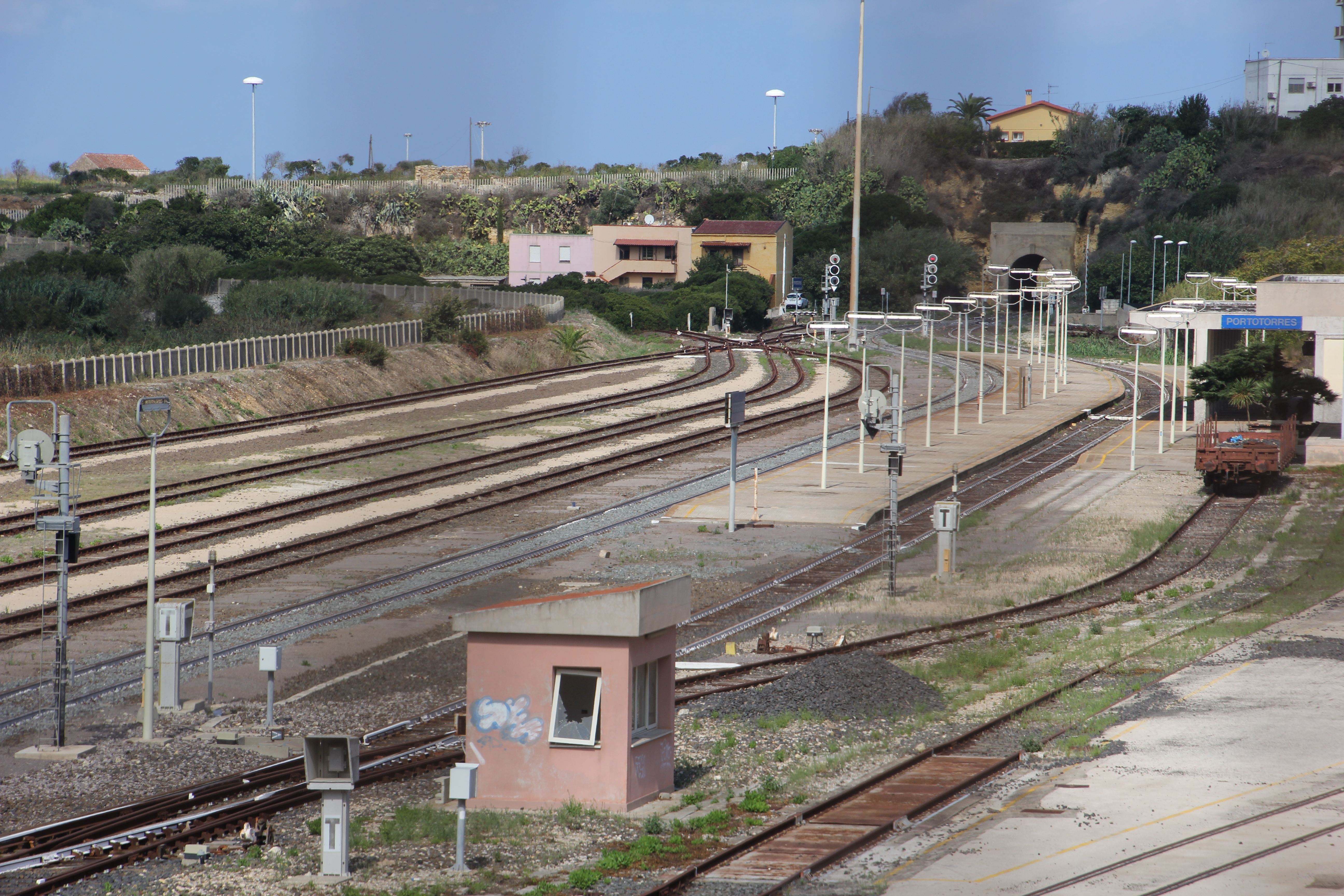 Porto Torres, stazione ferroviaria